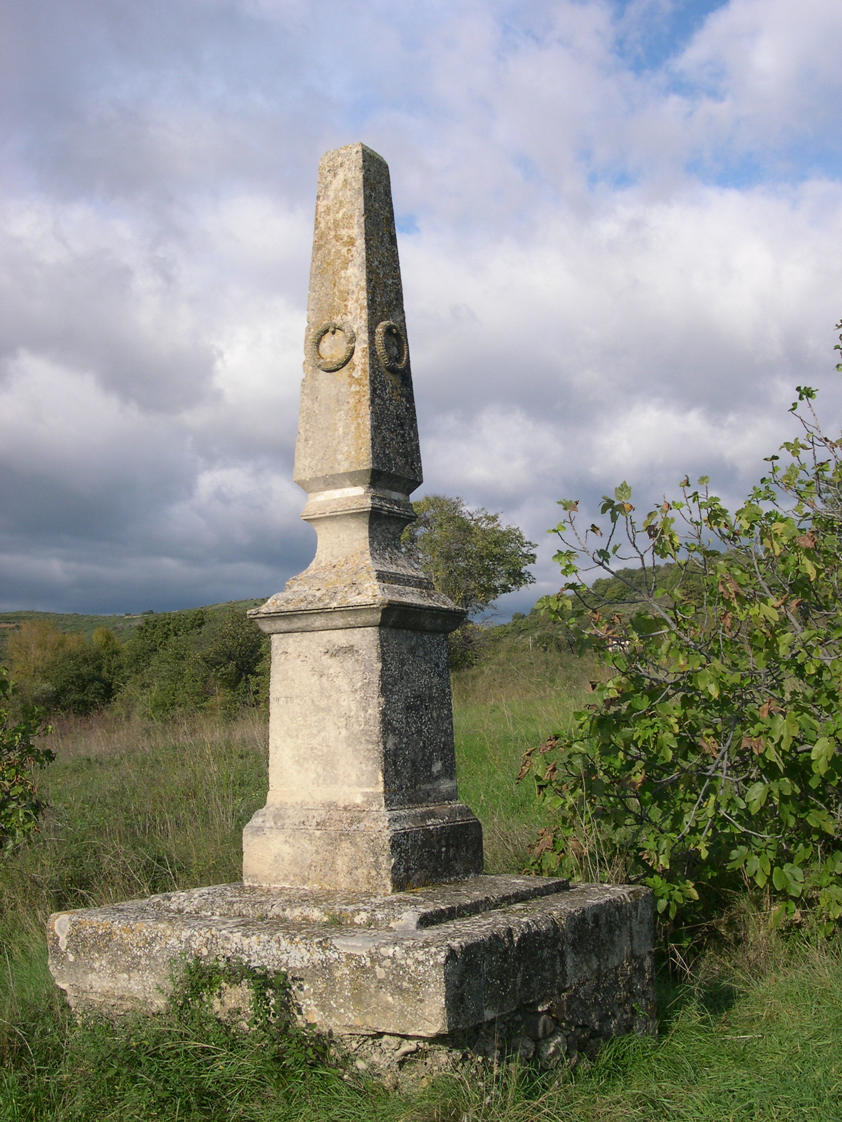 Roujan (Hérault) - Stèle à la mémoire de Jules Pierre ROUCAIROL + 16 December 1851, victime du Coup d'État de Napoléon III.